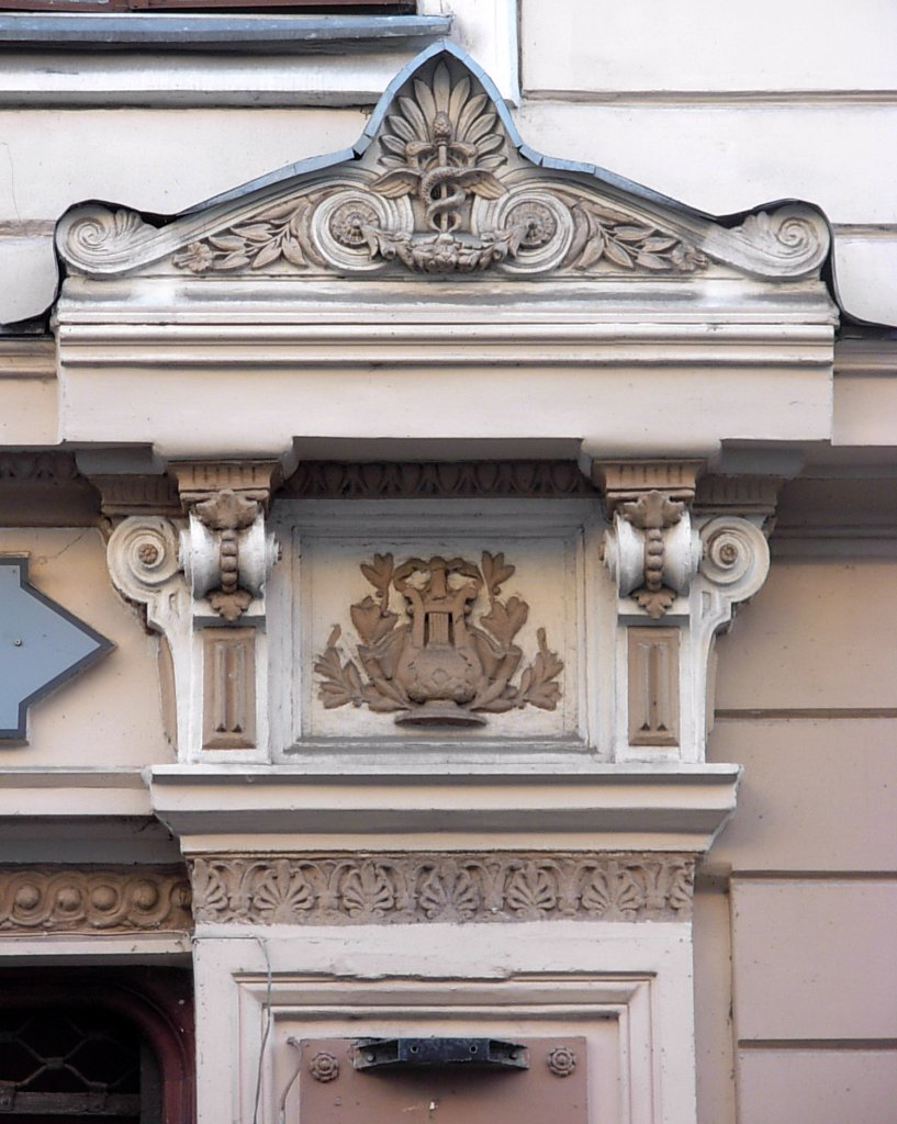 Kamienica Długa 32 w Bydgoszczy